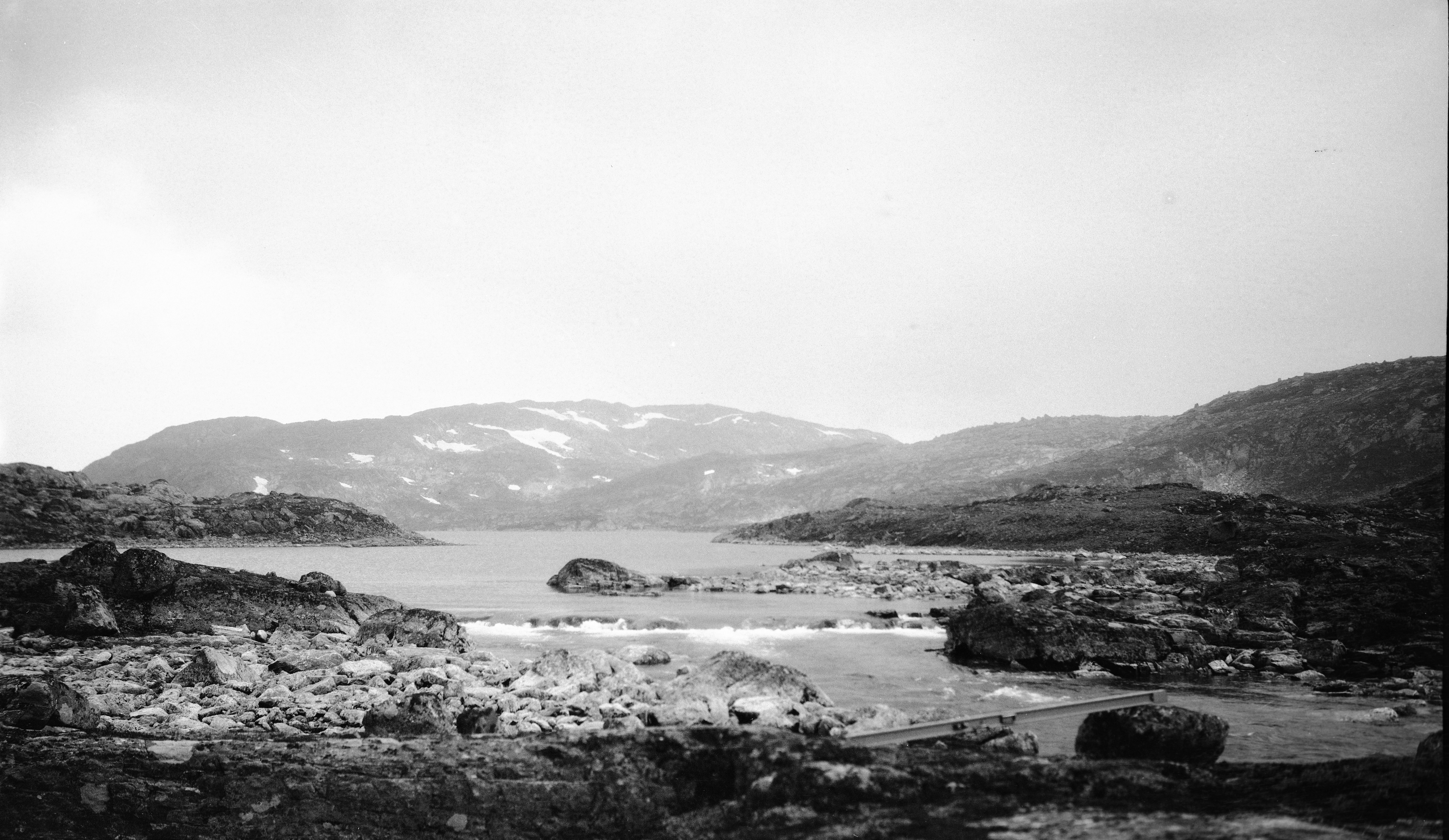 Utløpet av Store Urevatn før reguleringen.